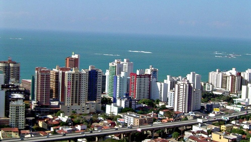 Linda Vista de Vila Velha/ES do Convento da Penha - Brasil.